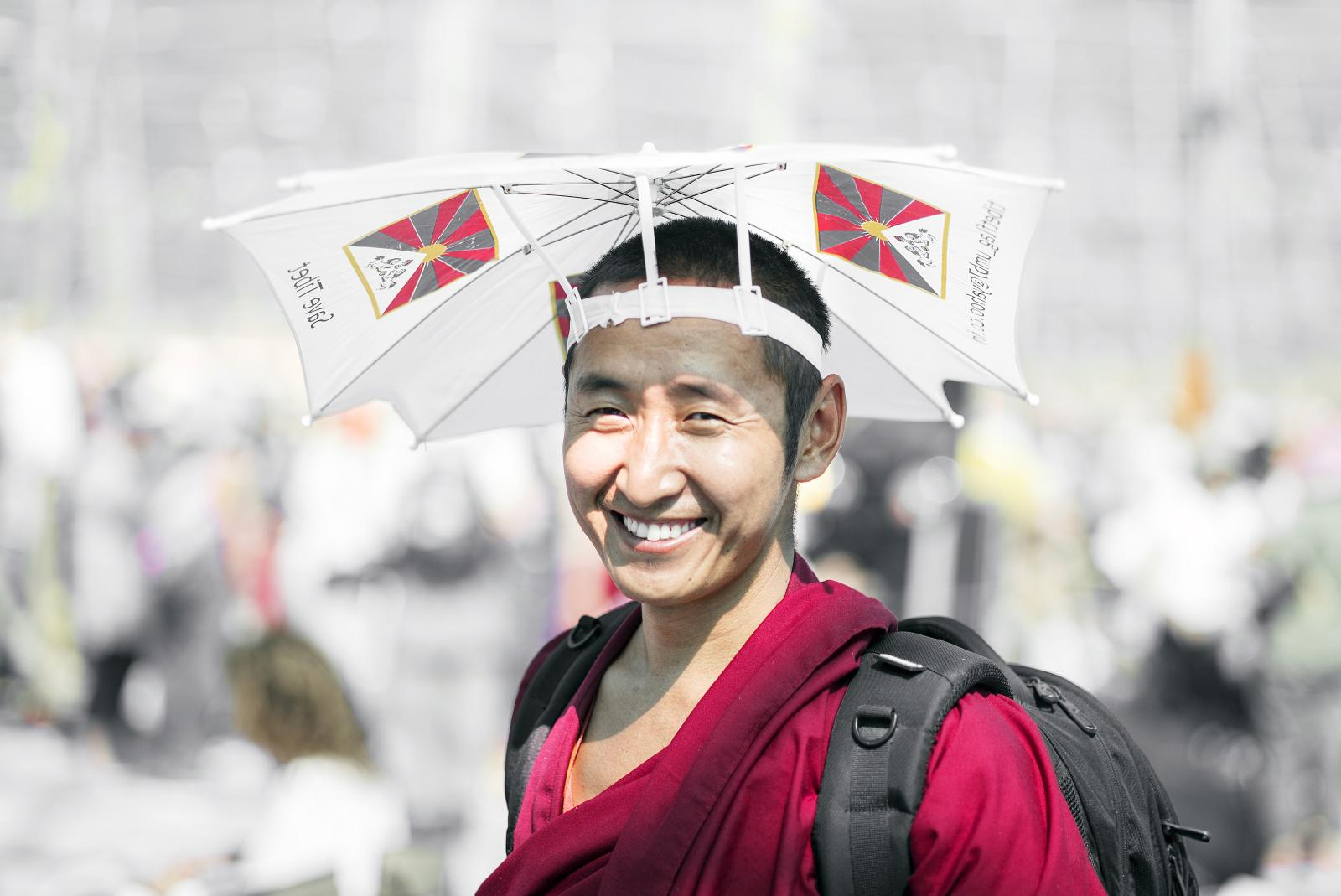 Monk wearing umbrella hat. Ladakh 2014